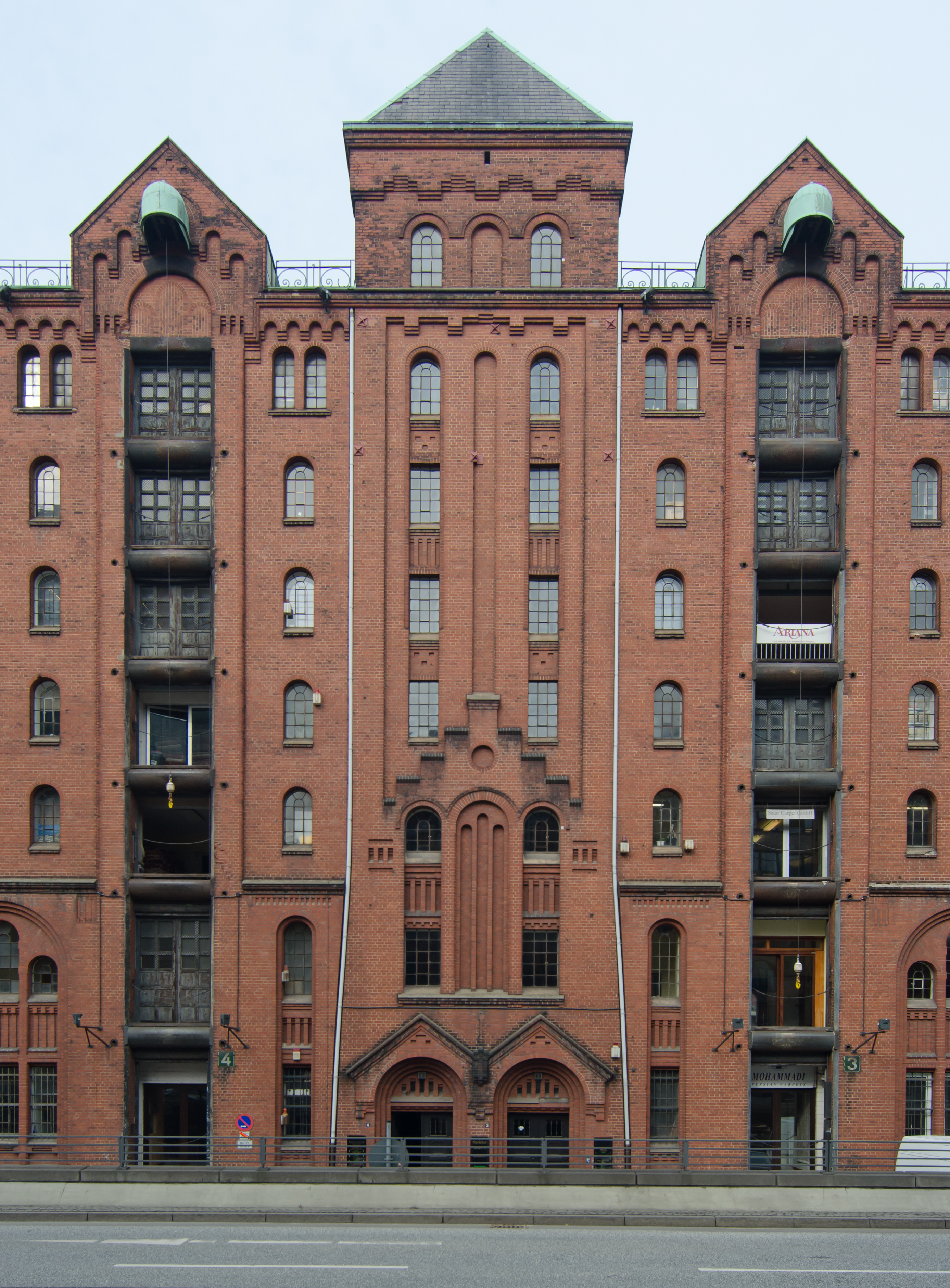 Hamburgisches Architekturarchiv - Fassade